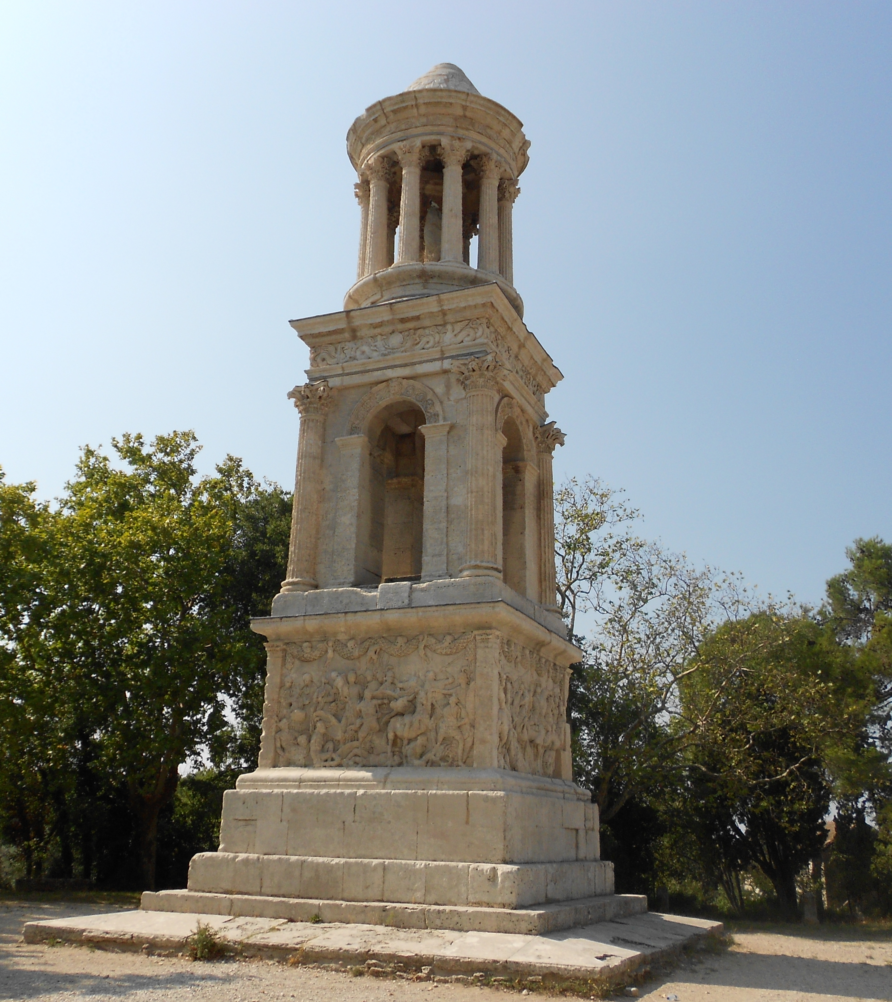 Vestige Romain du Mausolée de Glanum à Saint Rémy de Provence.